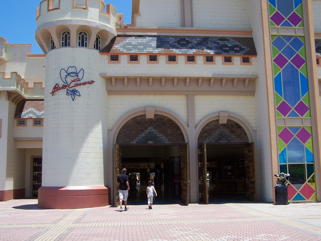 Entrada do Beto Carrero World